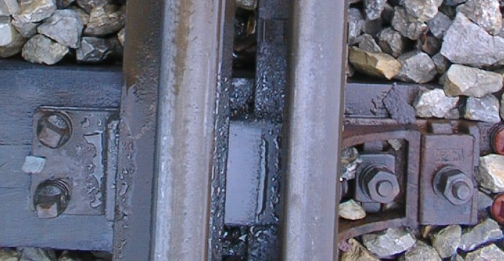 Schienenstuetze Stü 7